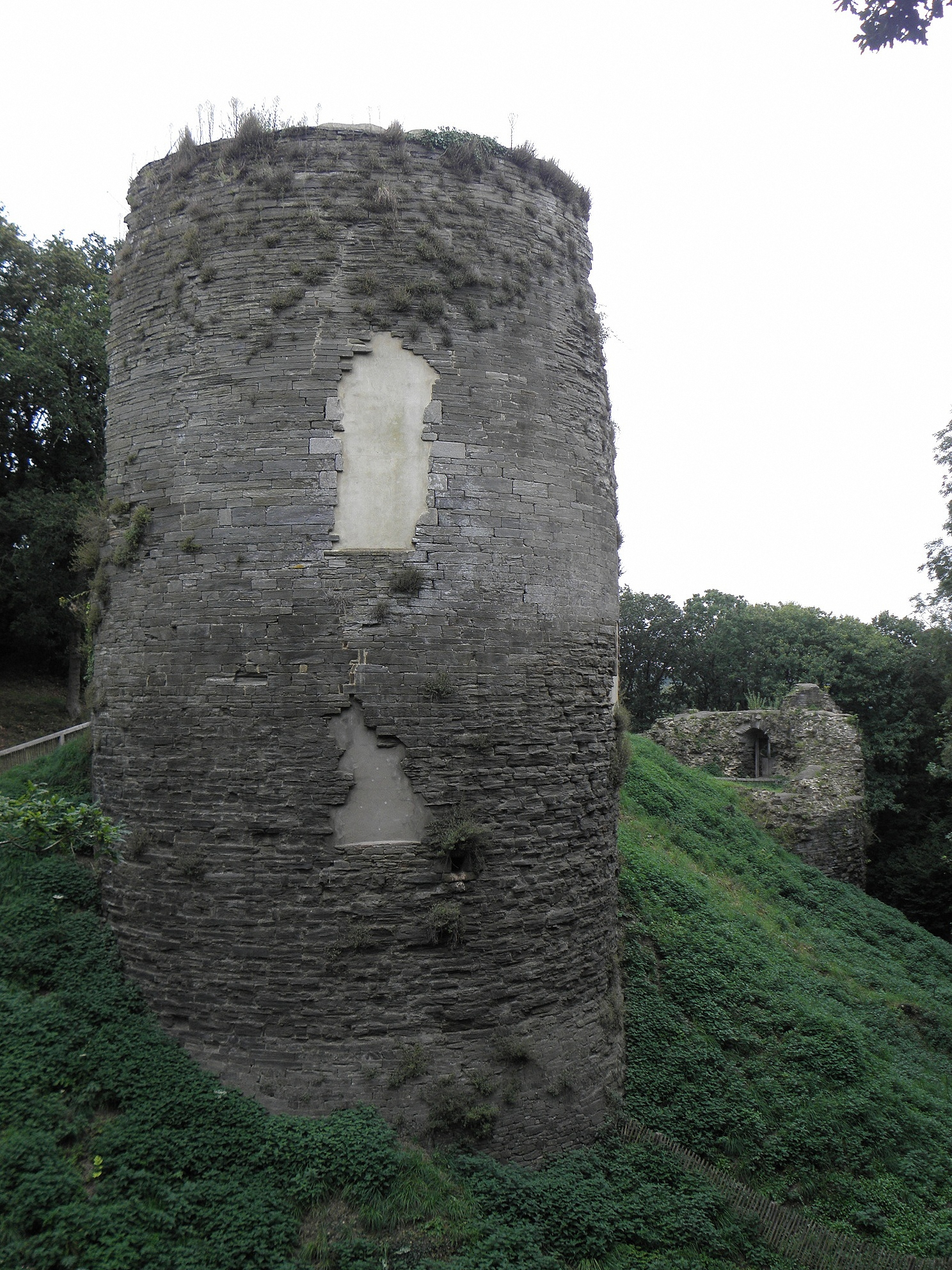 Ruines du donjon du château de Penhoat en Saint-Thégonnec (29). .